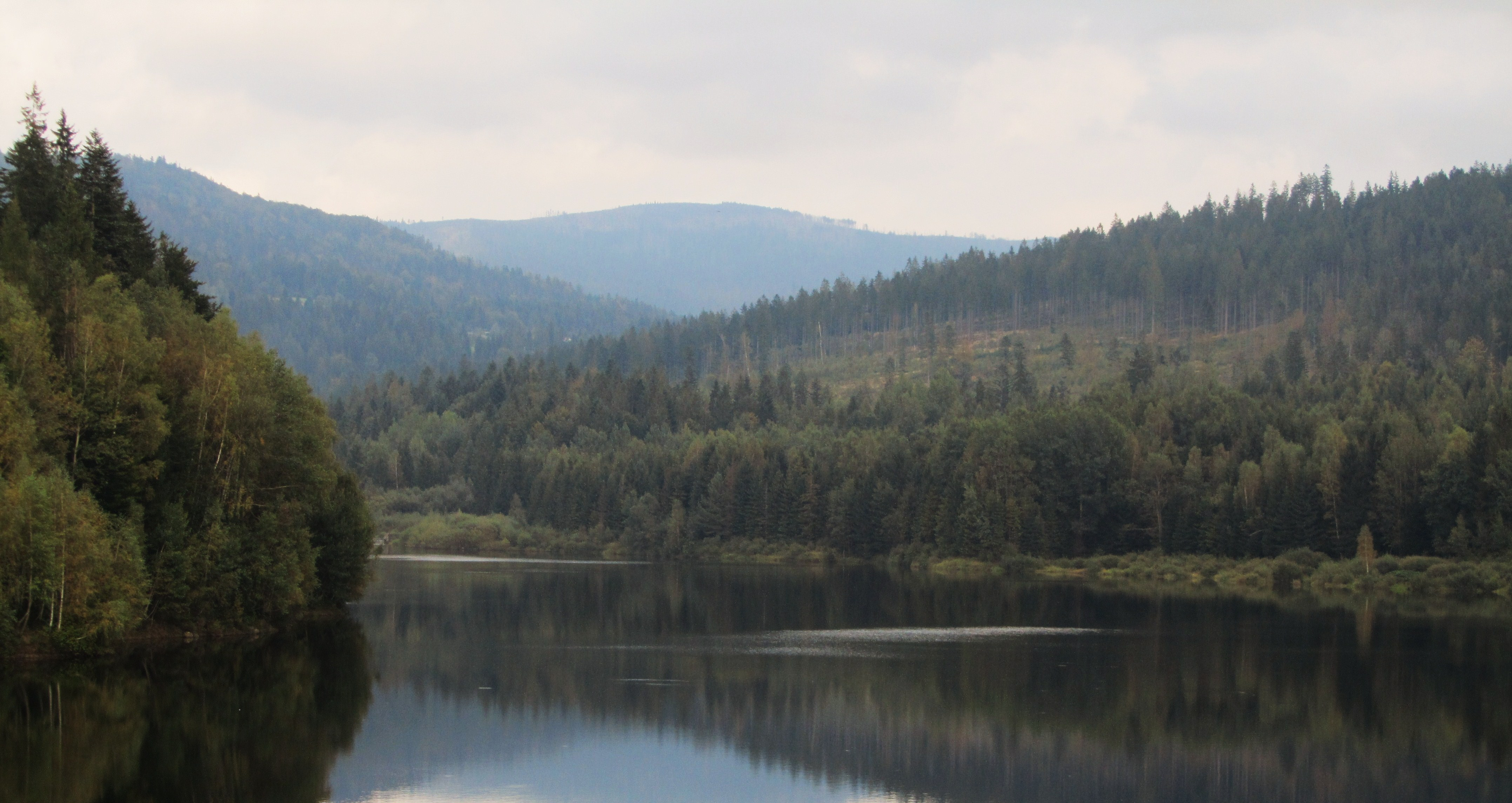 PANORAMA Z MALINKI.